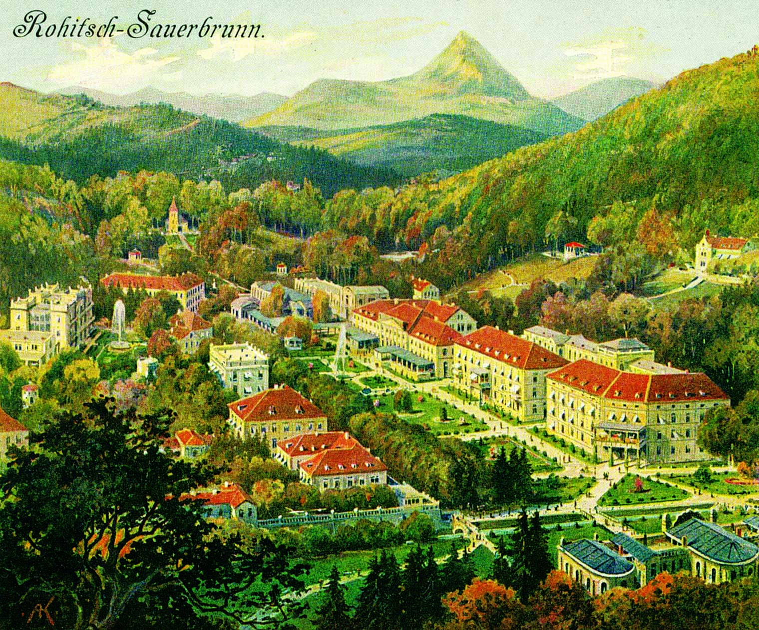 Rogaška Slatina. Stara razglednica.